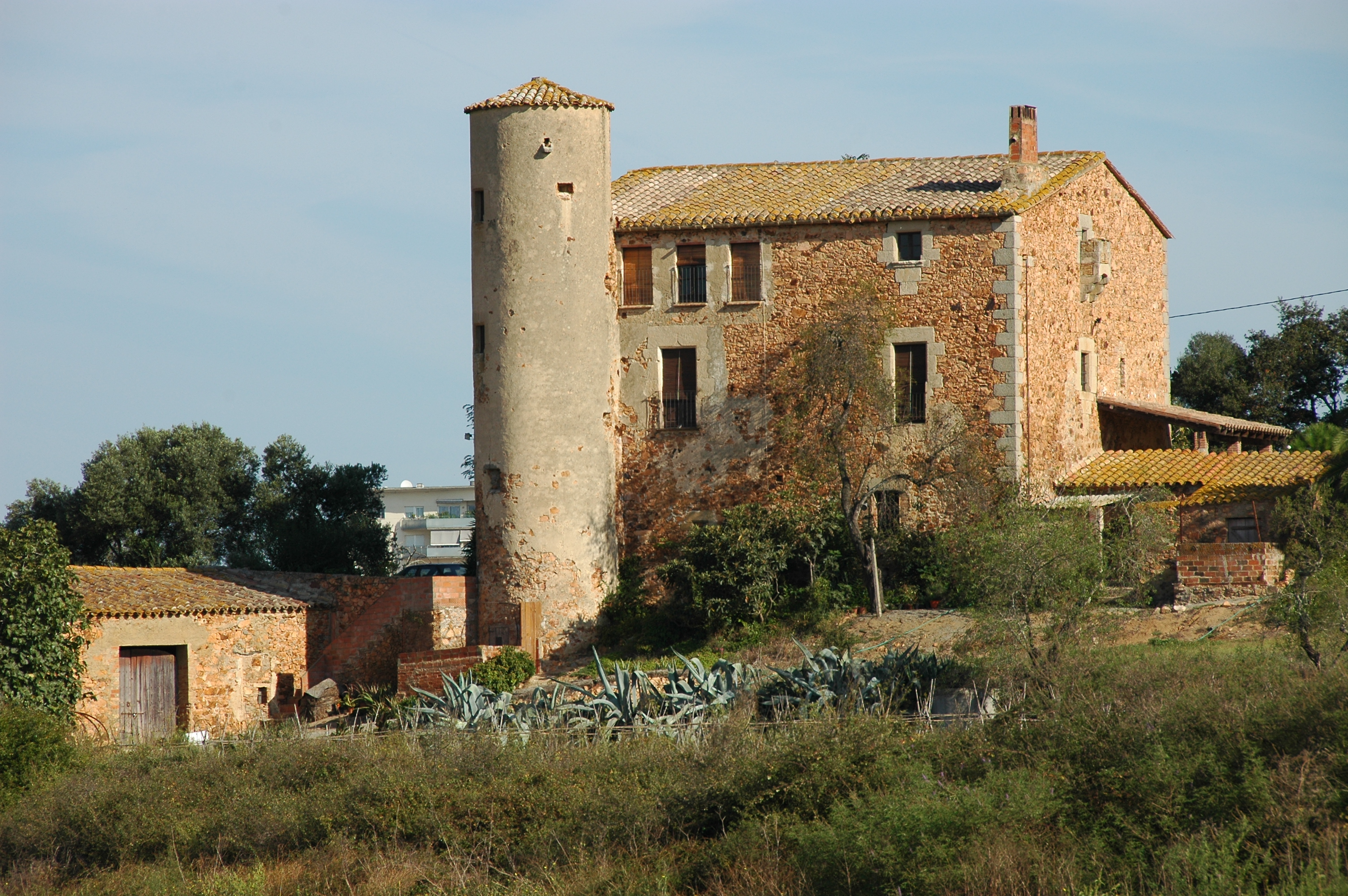 Torre Roja, a Palafrugell (Baix Empordà).